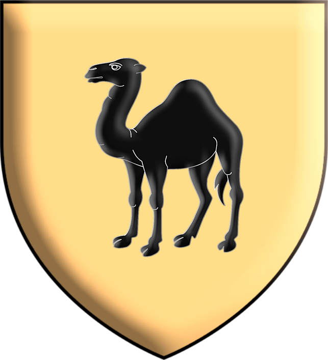 Armes des familles DUCHEMIN des CEPEAUX et DUCHEMIN de VAUBERNIER : d'or au dromadaire passant de sable. (dromadaire dessiné par Jacques63)